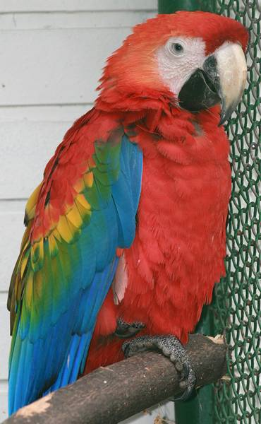 Ara arakanga